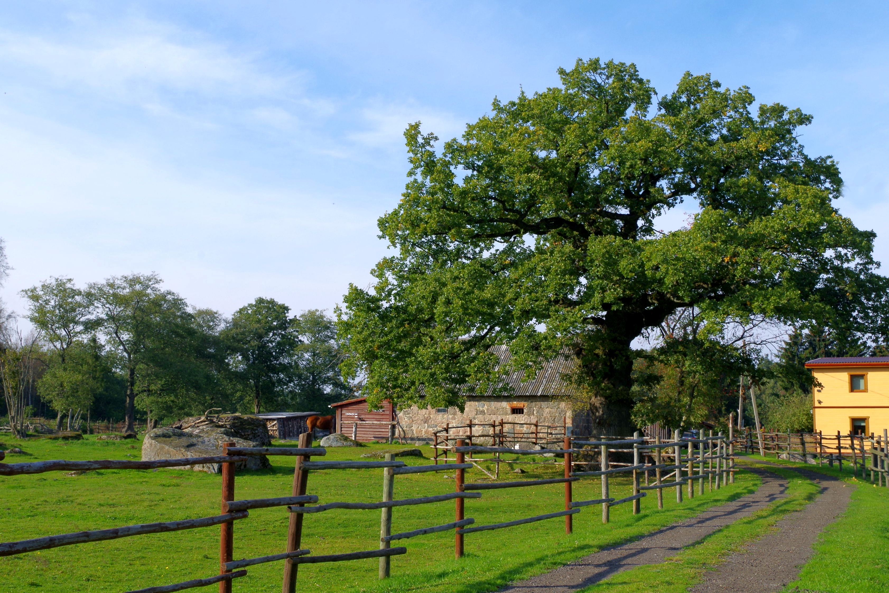 Riiasöödi tamm